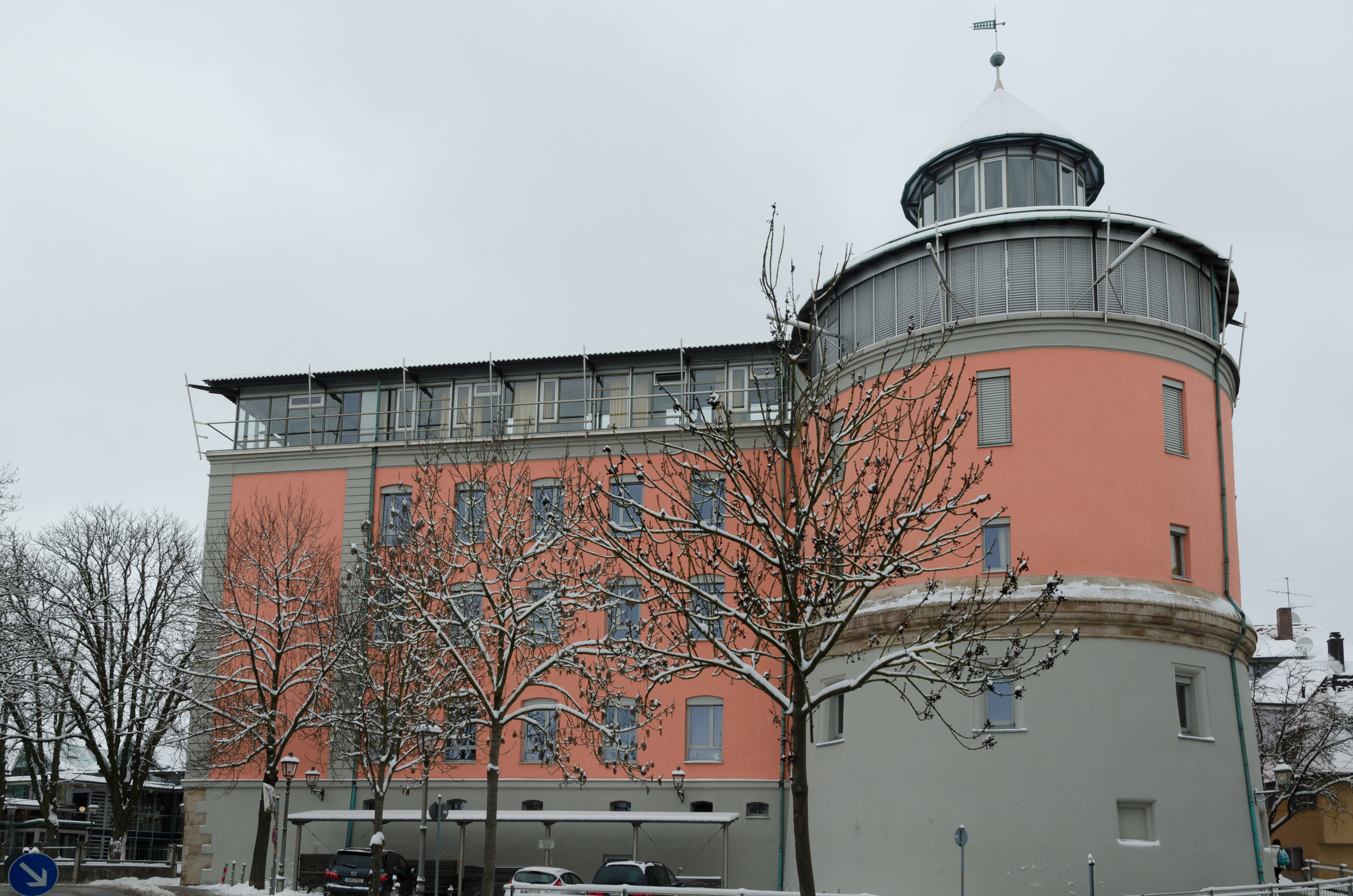 Ansbach, Reuterstraße 9